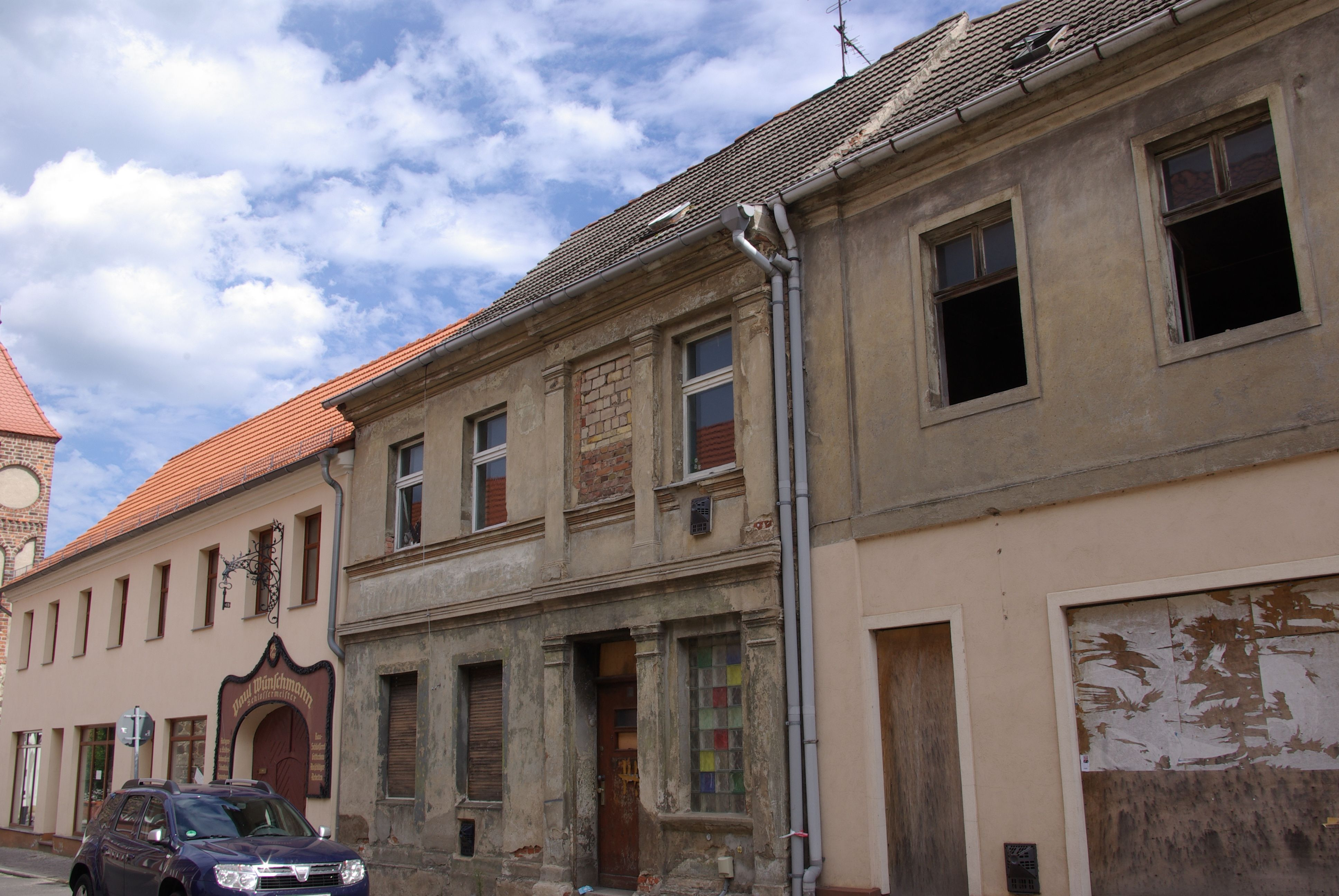 Jüterbog in Brandenburg. Das Haus in der Zinnaer Straße 5 steht unter Denkmalschutz.